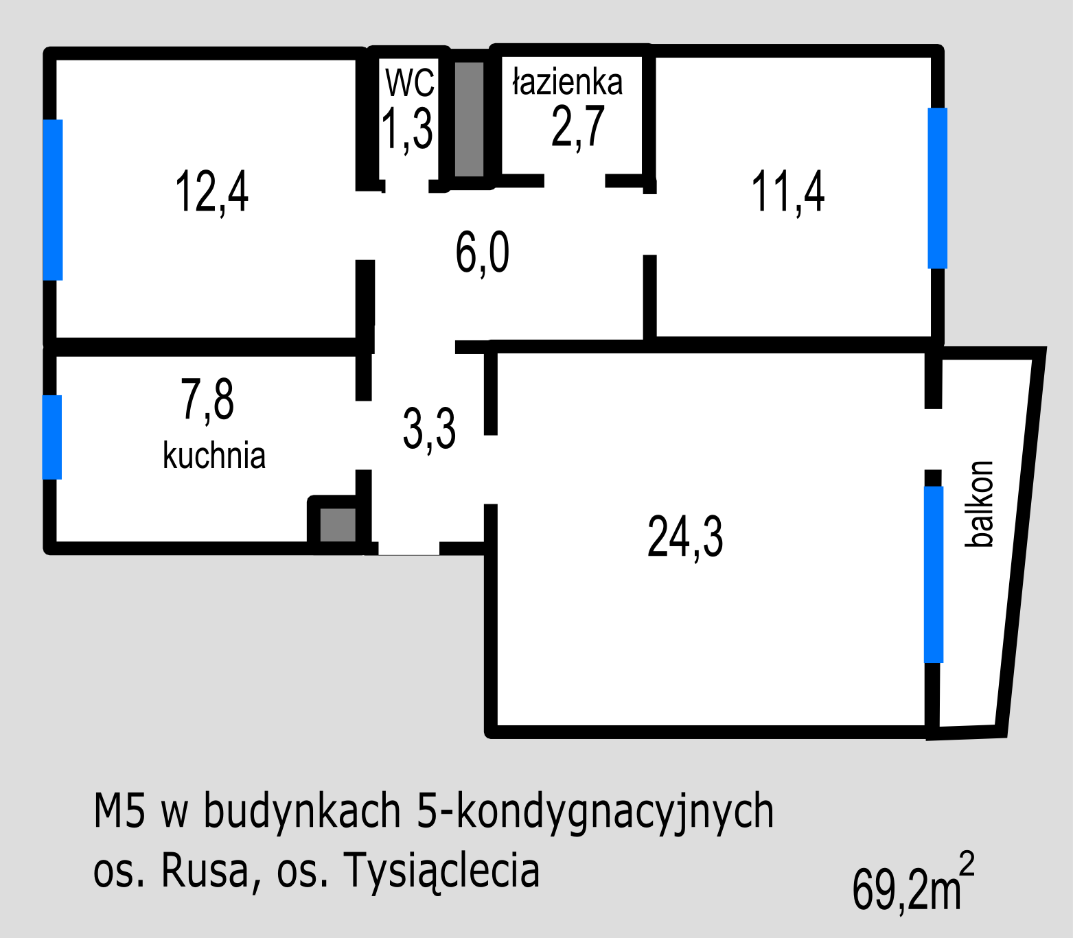 M5 (69,2 m²) w budynkach 5-kondygnacyjnych na os. Rusa i Tysiąclecia (S-11)